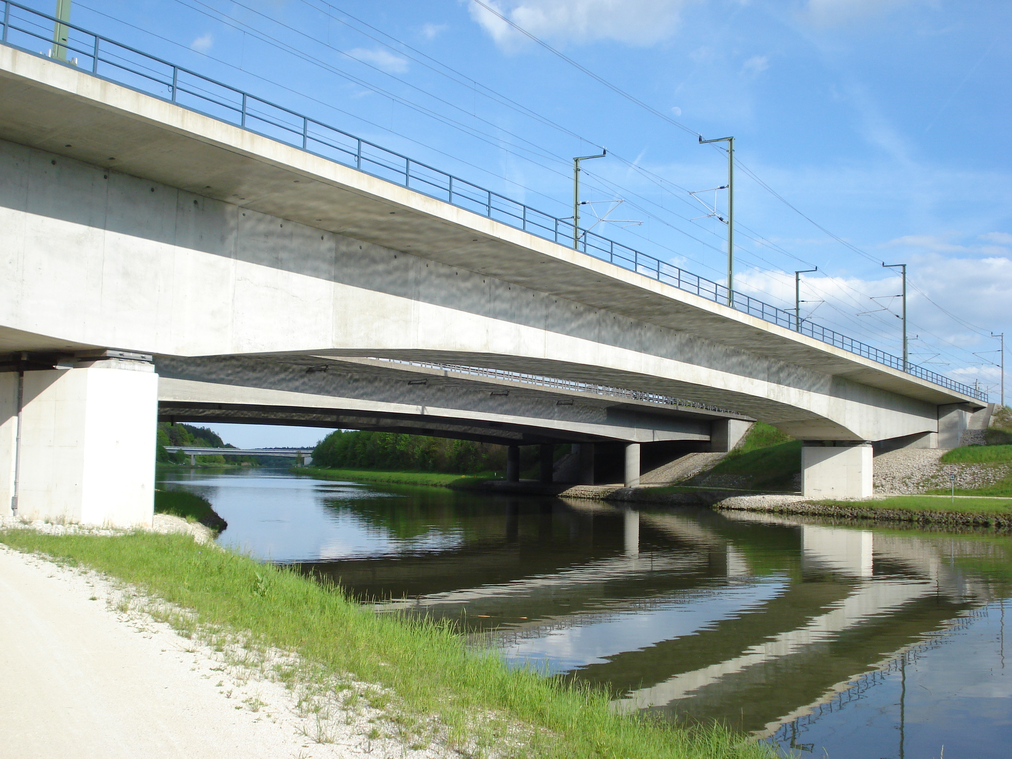 Die Brücke der Schnellfahrstrecke Nürnberg-Ingolstadt über den Main-Donau-Kanal bei Hilpoltstein im Mai 2010.